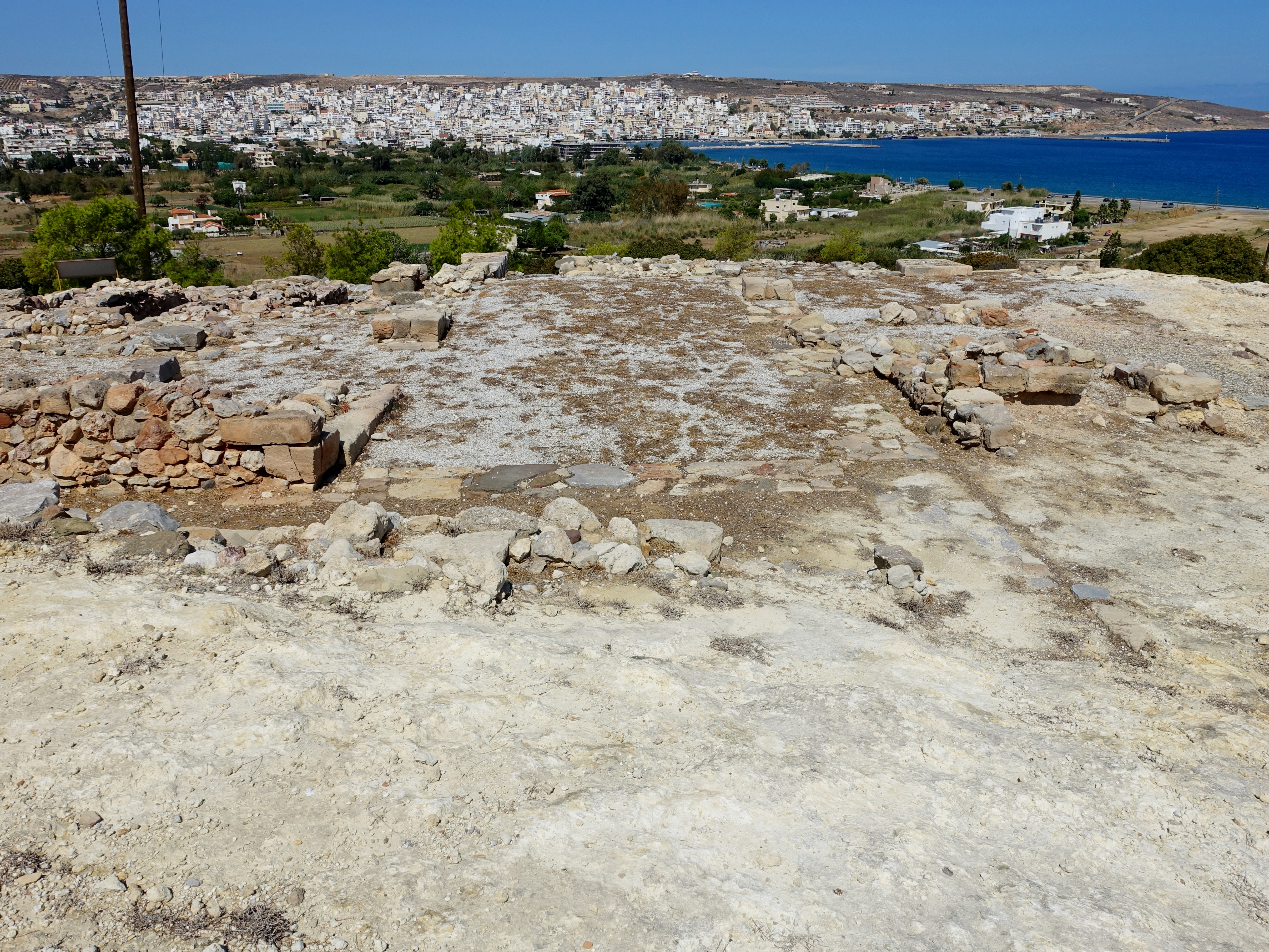 Minoische Ausgrabungsstätte von Petras (Πετράς), Gemeinde Sitia, Kreta, Griechenland